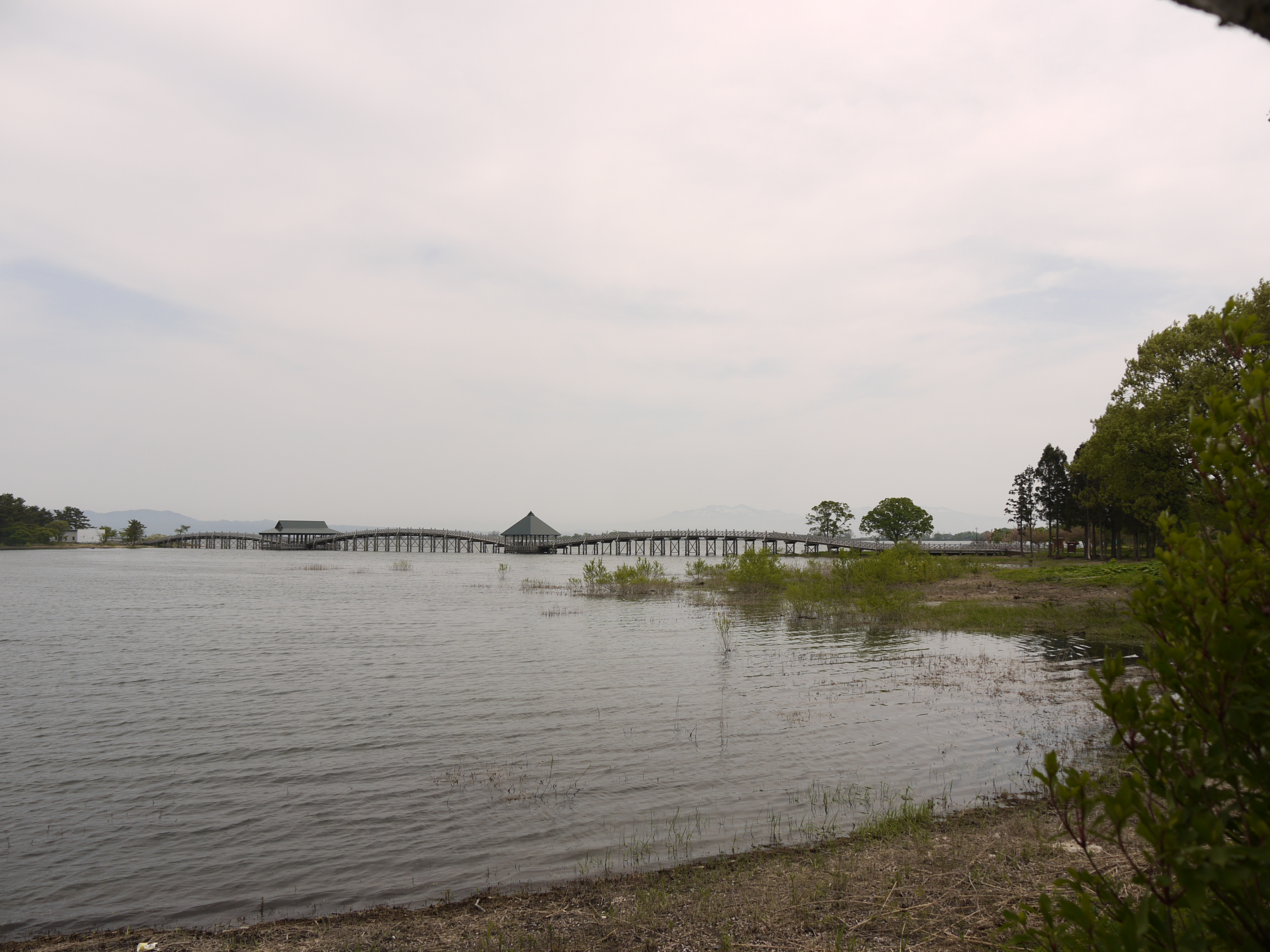 津軽富士見湖 鶴の舞橋